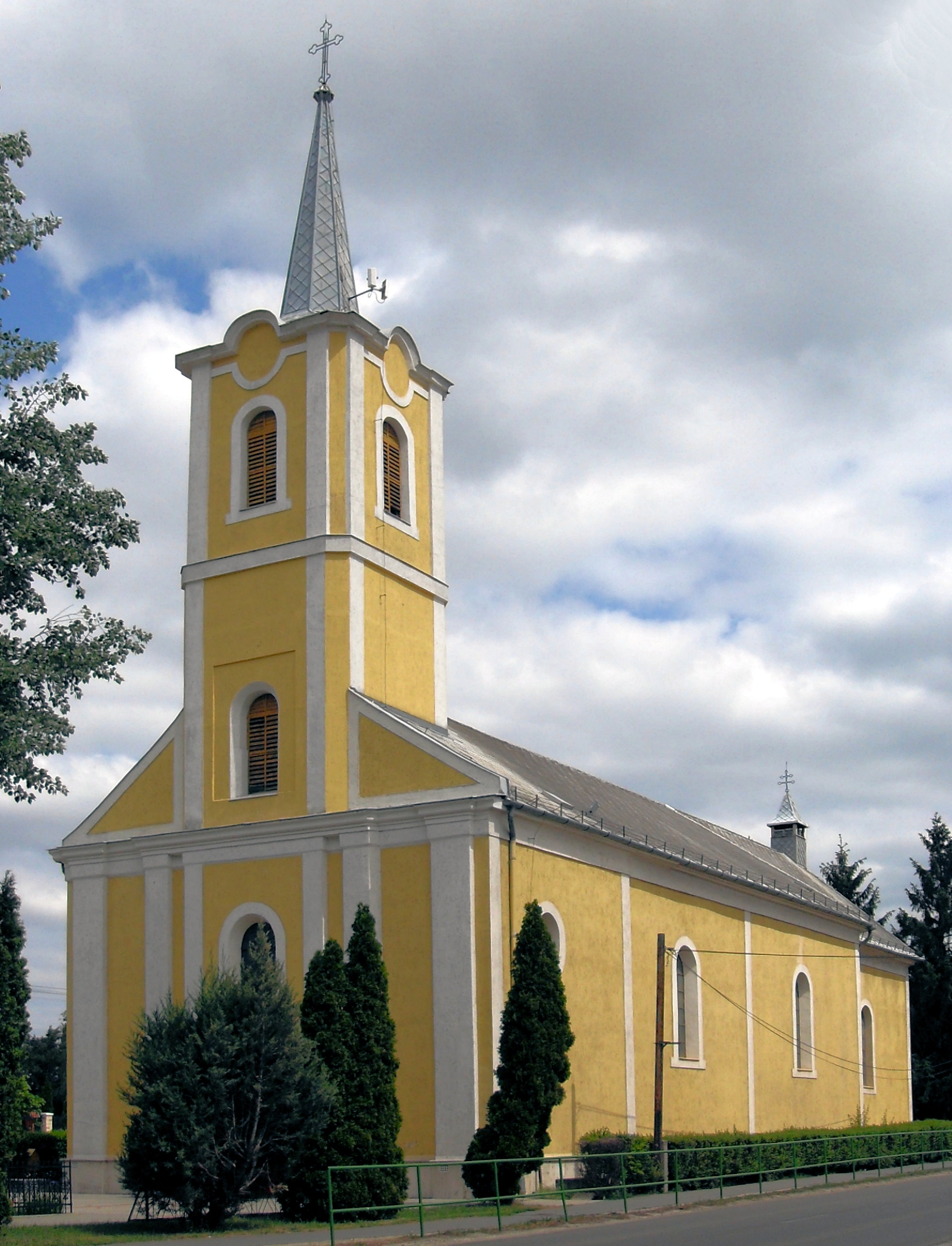 Szent Erszébet Római katolikus templom Kartal